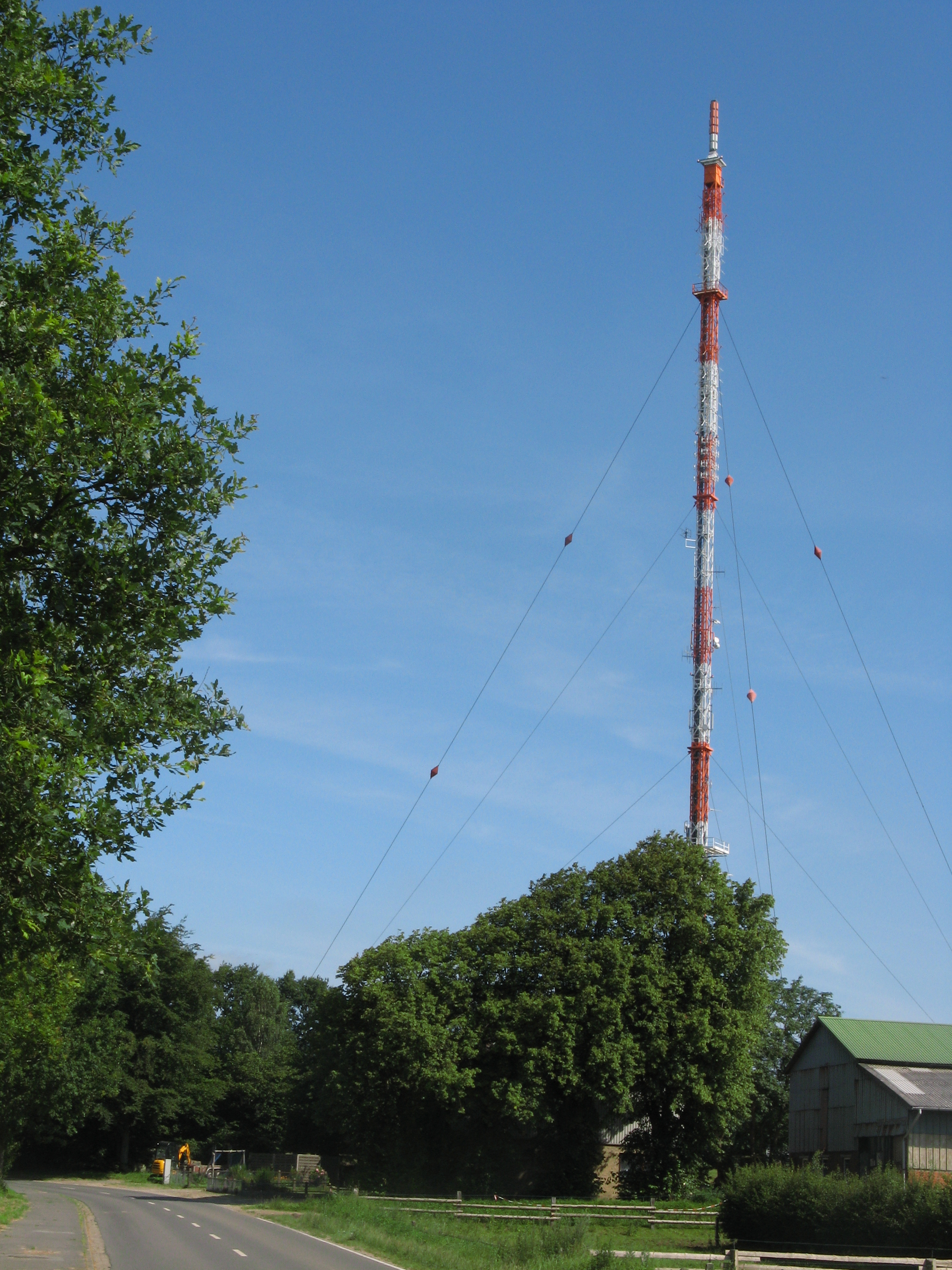 Sendeturm in Welmbüttel